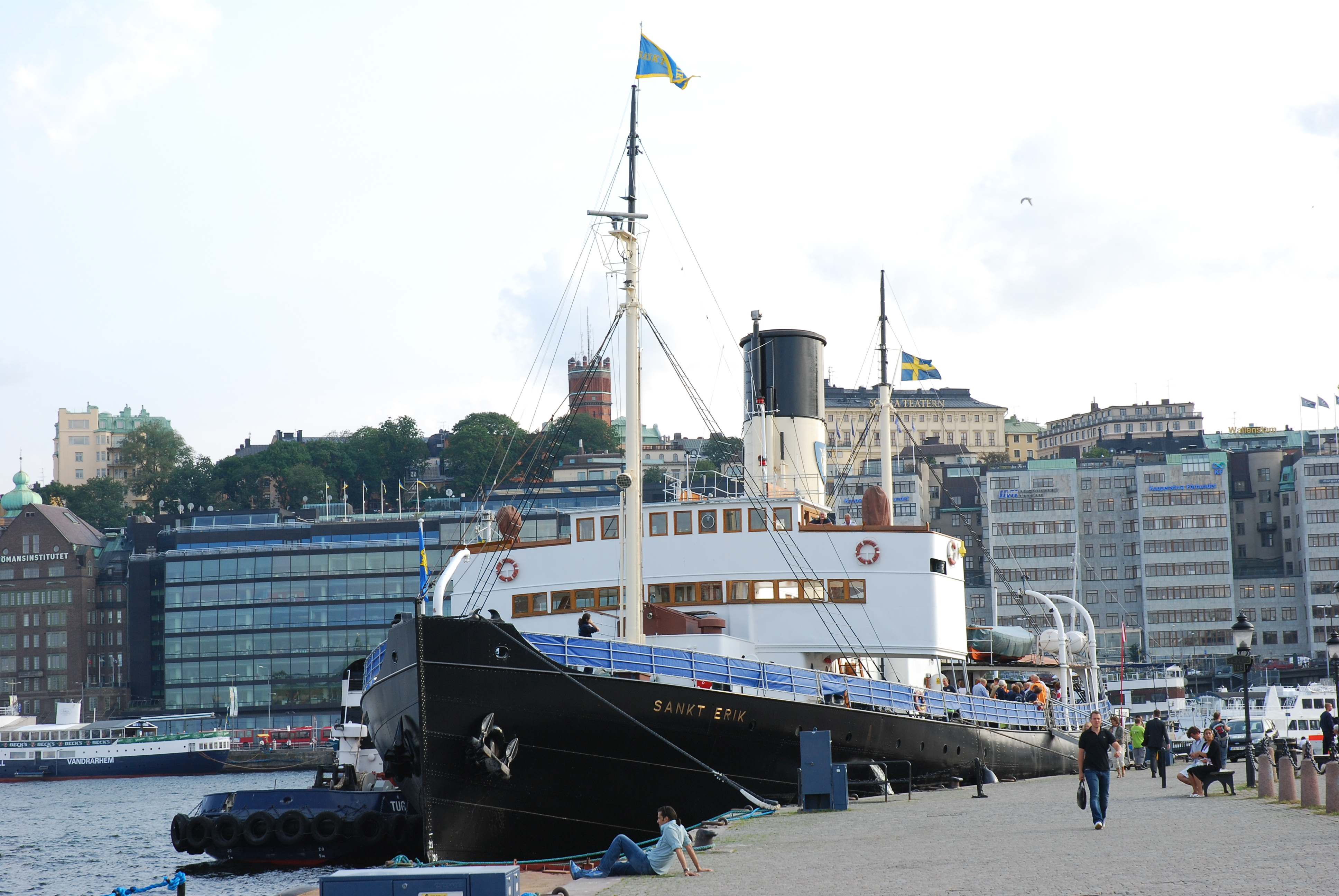 Icebreaker and museum ship S/S Sankt Erik, moored at Skeppbron, Stockholm, August 2007. IMO number: 5311442